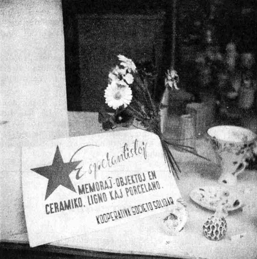 UK 1948. En multe da butikoj en la urbo oni vidis reklamojn en esperanto. — Samtempe oni menciu, ke kelkaj restoracioj skribis siajn manĝokartojn en esperanto.